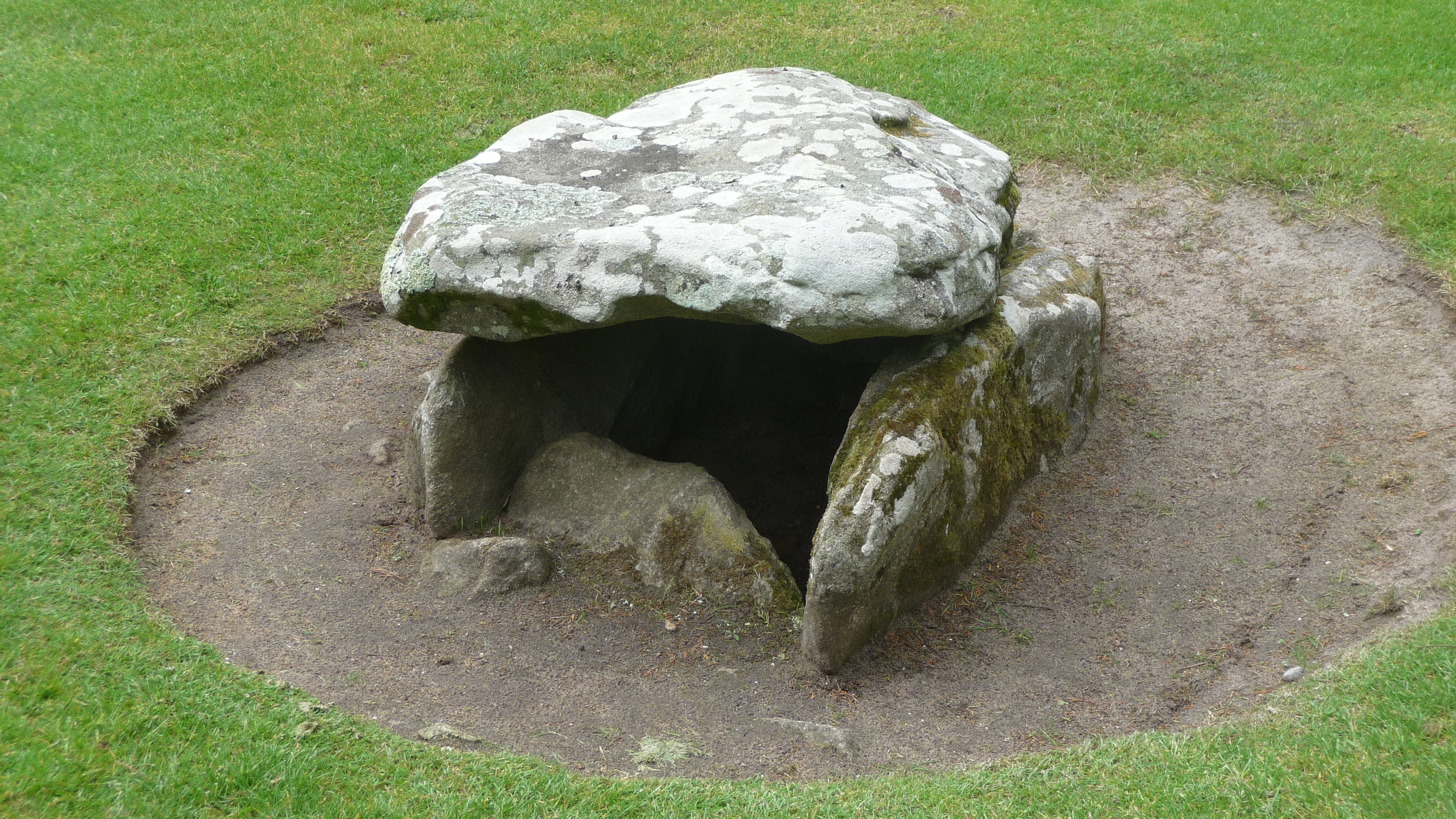 Île de Batz : jardin Geoges Delaselle, tombe de la nécropole